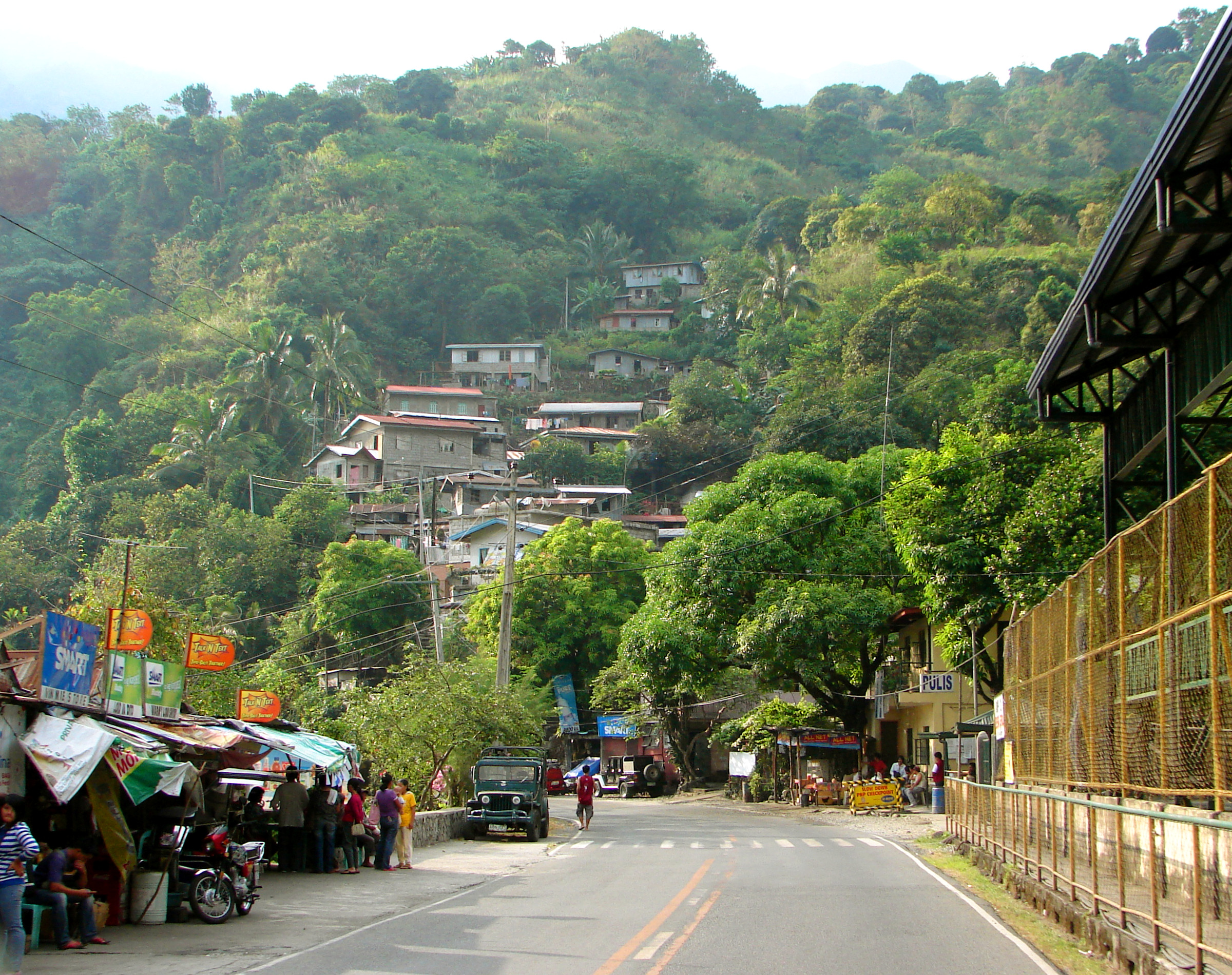 Camp 3, Tuba, Benguet, Philippines